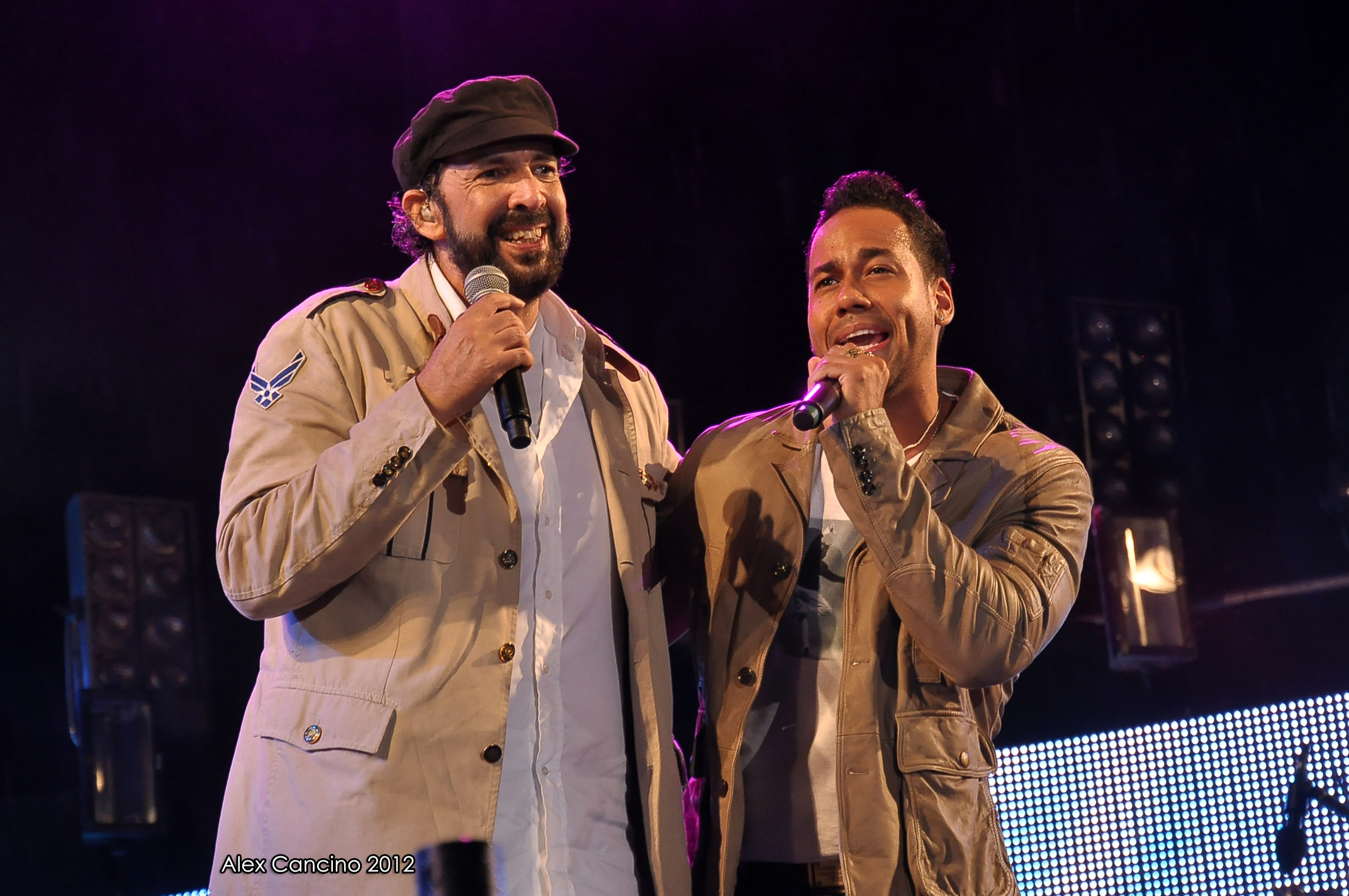 Anthony Romeo Santos junto a Juan Luis Guerra, Estadio Olímpico, Santo Domingo 2012